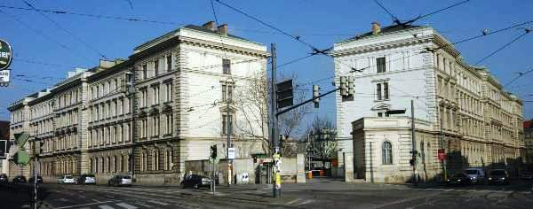 ehemalige Rennweg-Kasere am Rennweg (Wien03)